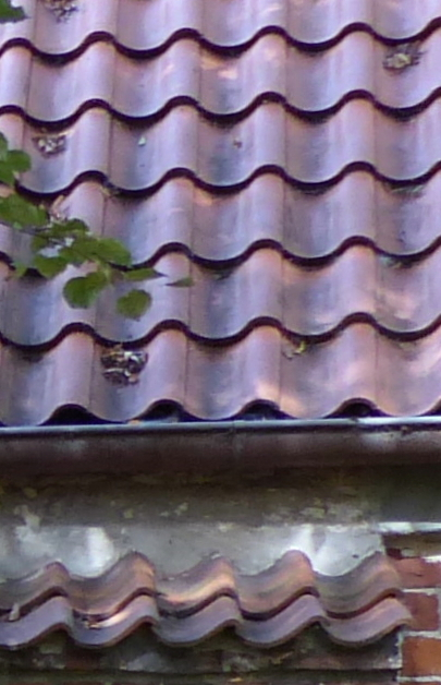 Martinskirche Schiffdorf: Dach des Chors von Süden mit Oberkante eines Strebepfeilers